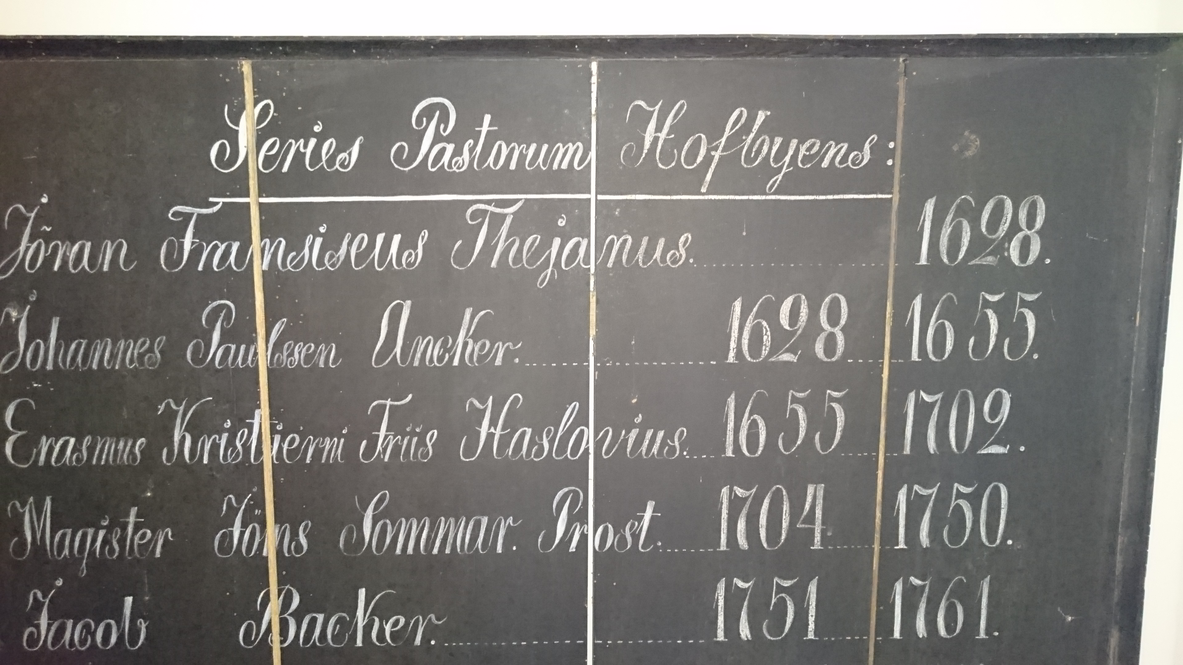 Sognepræster i Ö Hoby kirke.